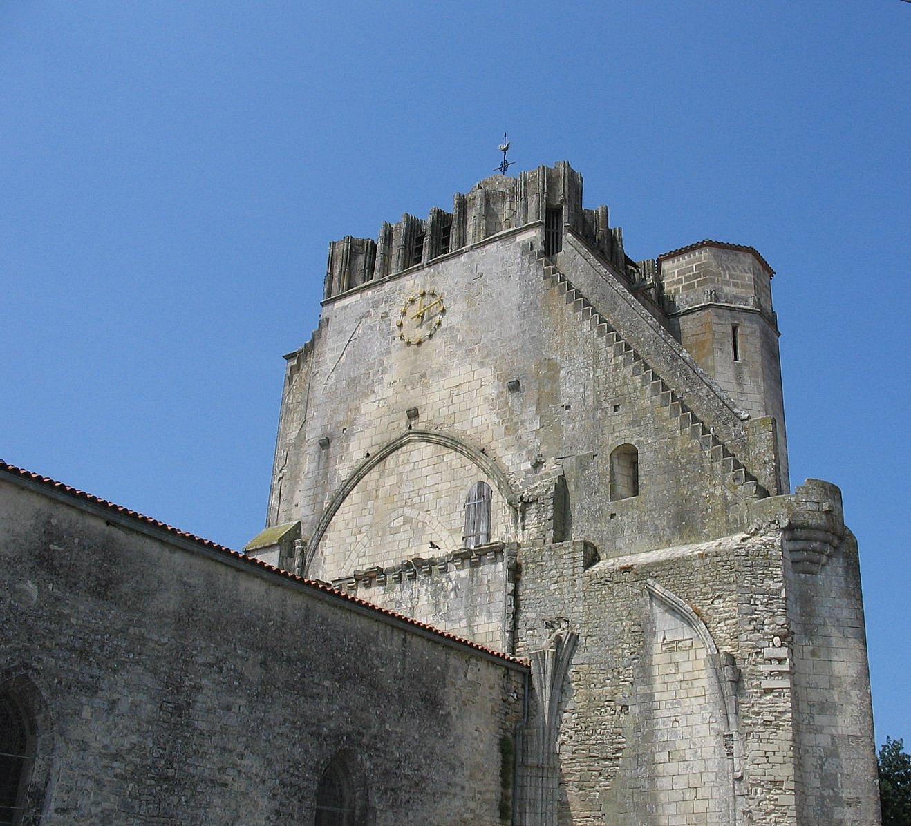 Église Saint-Pierre (XIVe-XVe siècles) à Marsilly (Charente-Maritime)